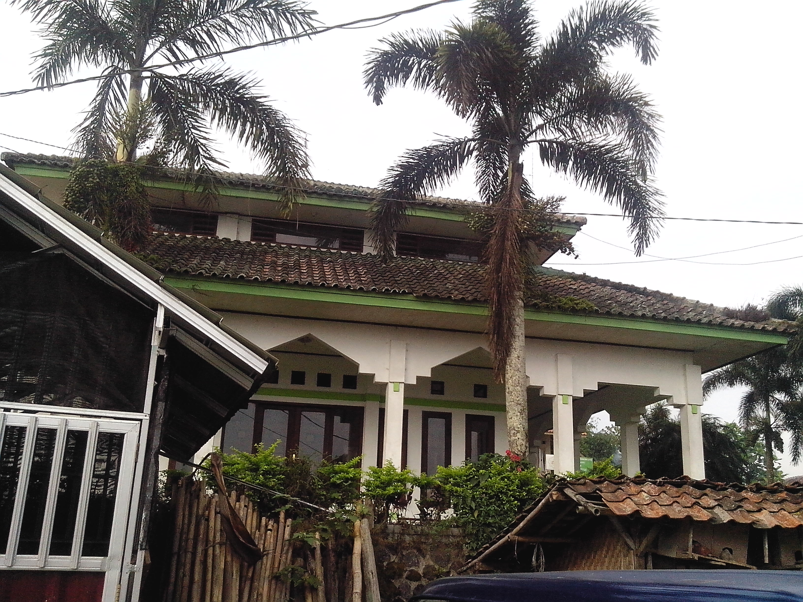 Nama masjid : An-nuur Lokasi : Kampung Cisitu Rt. 016/006